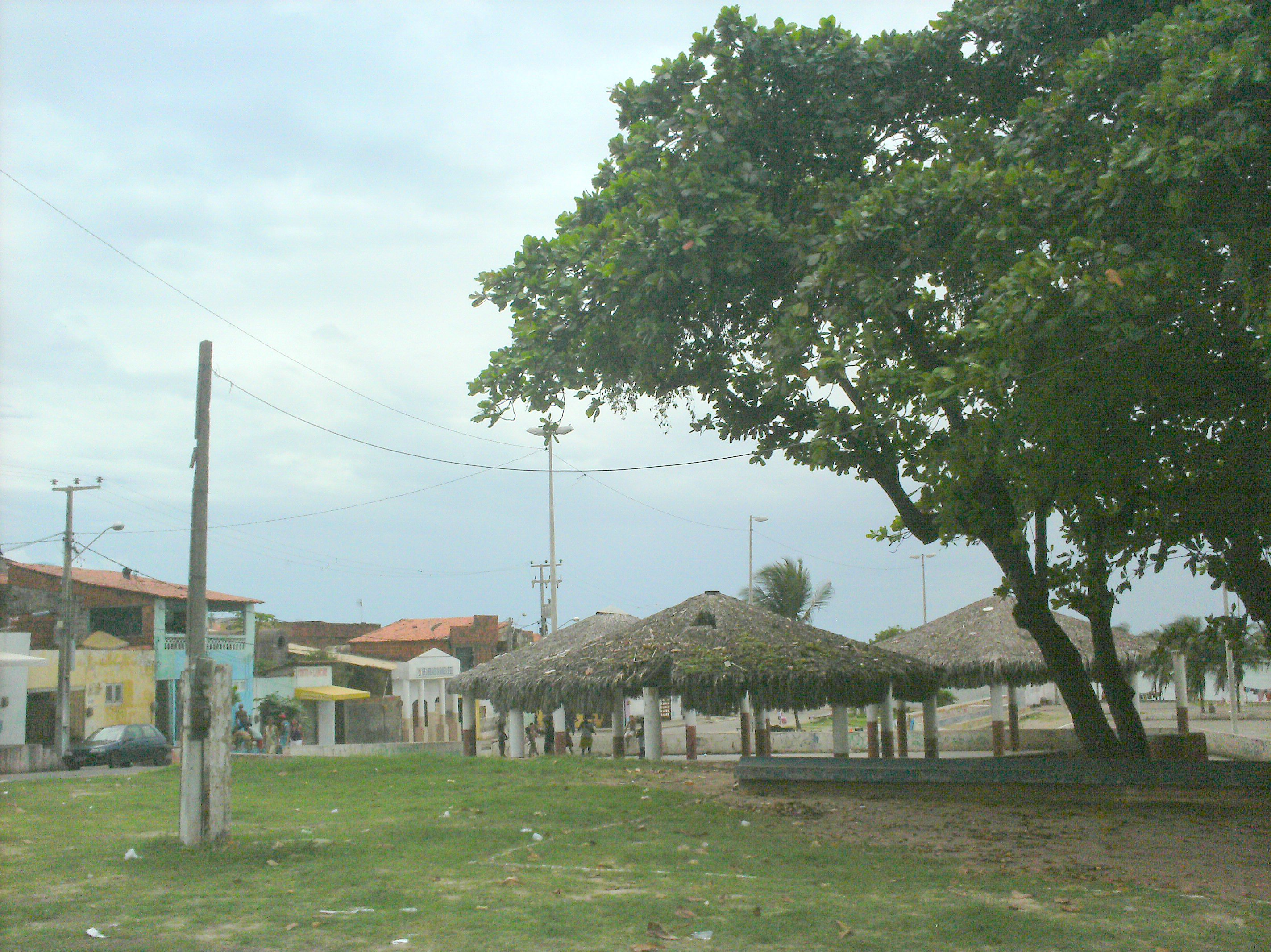 Vista do bairro Pirambu de Fortaleza.